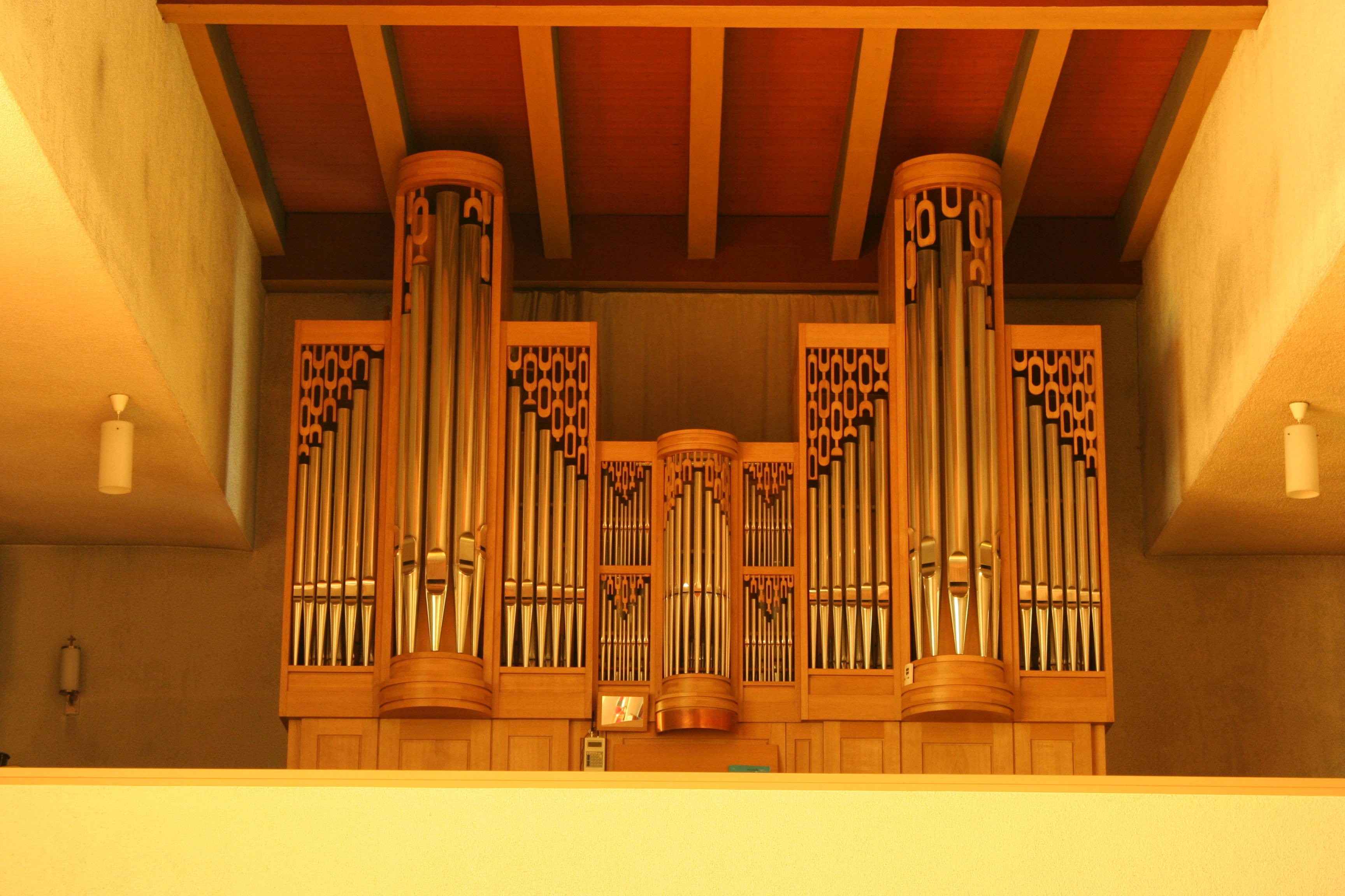 Römisch-katholische Pfarrkirche Herz Jesu Turbenthal, Orgel